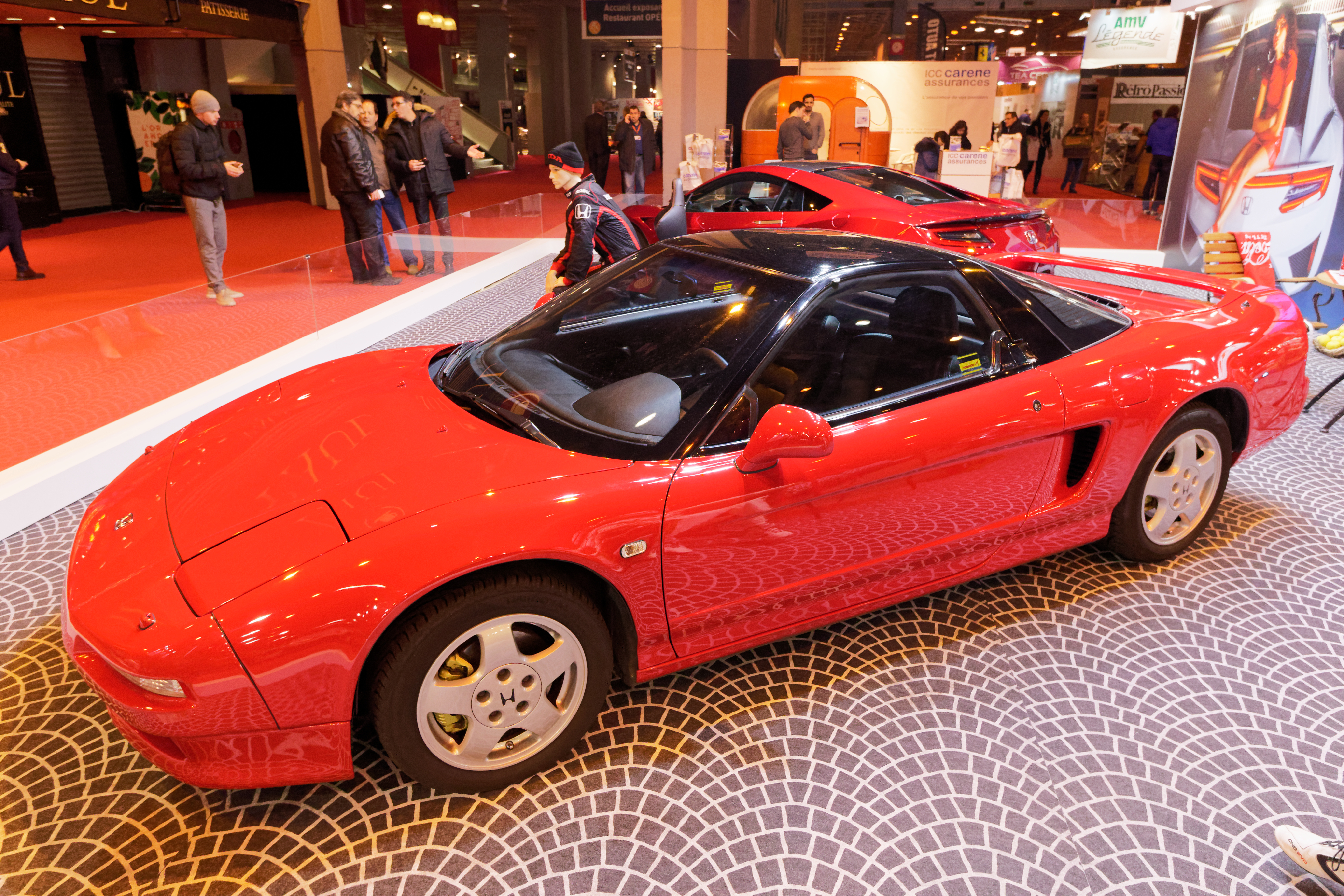 Un Honda NSX de 1994 exposé lors du salon Rétromobile 2017.